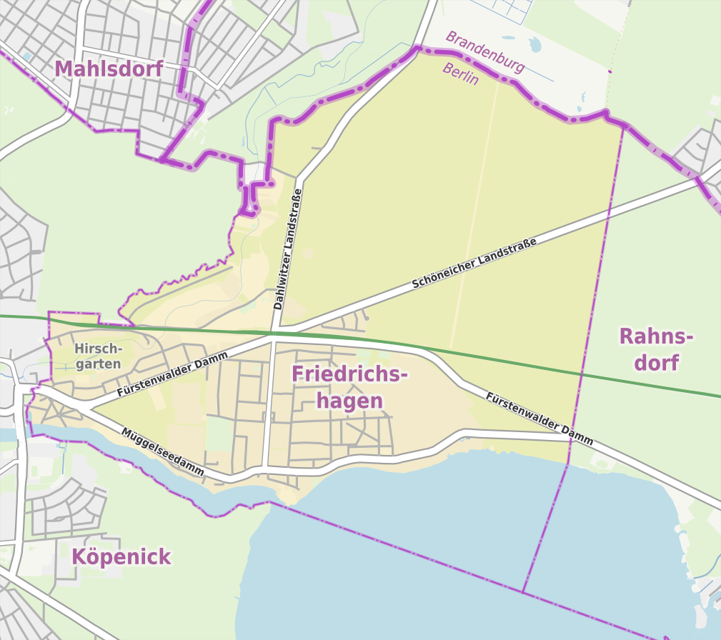 Übersichtskarte der Straßen und Ortslagen in Berlin-Friedrichshagen